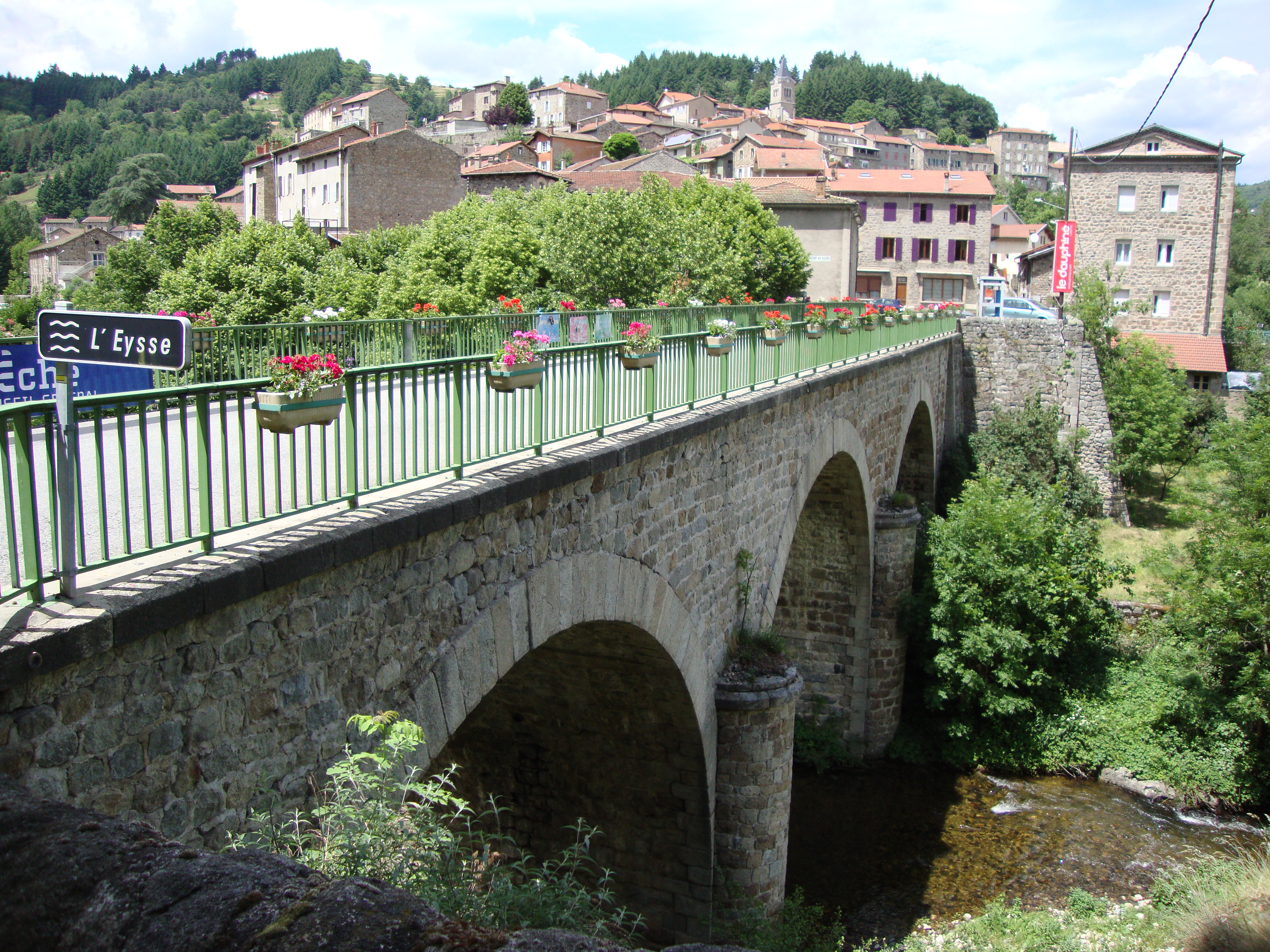 St.Martin-de-Valamas (Ardèche) pont sur l'Eysse